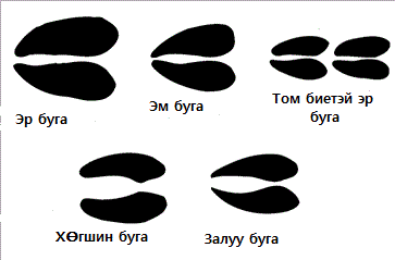 Монгол: Бугын мөр